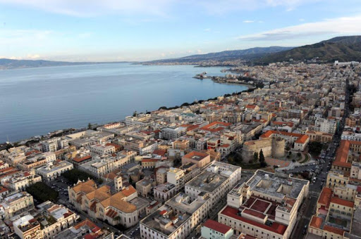 vista dall'alto